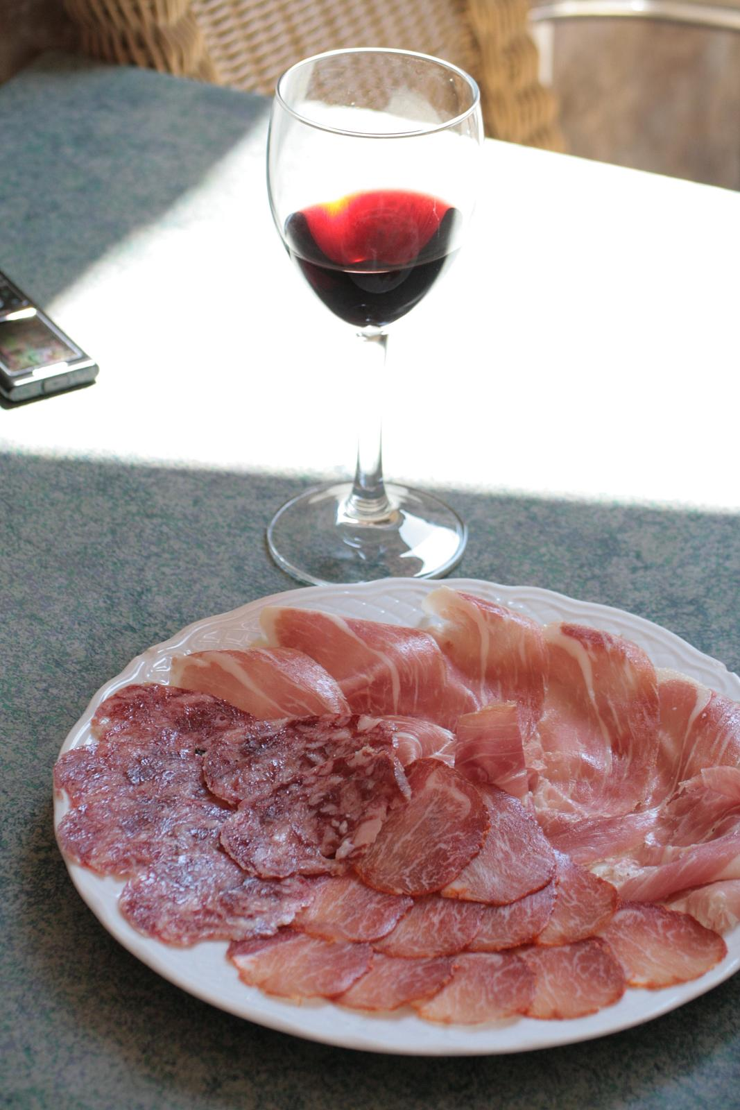 Surtido de embutidos ibéricos compañados de una copa de vino.